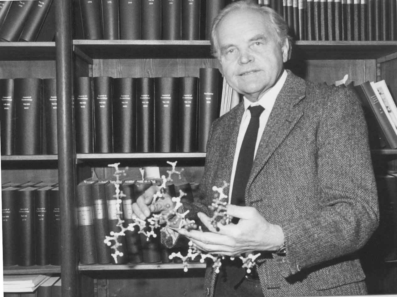 Prof. Dr. Otto Kandler mit dem chem. Modell von Pseudomurein, Archiv Familie Kandler